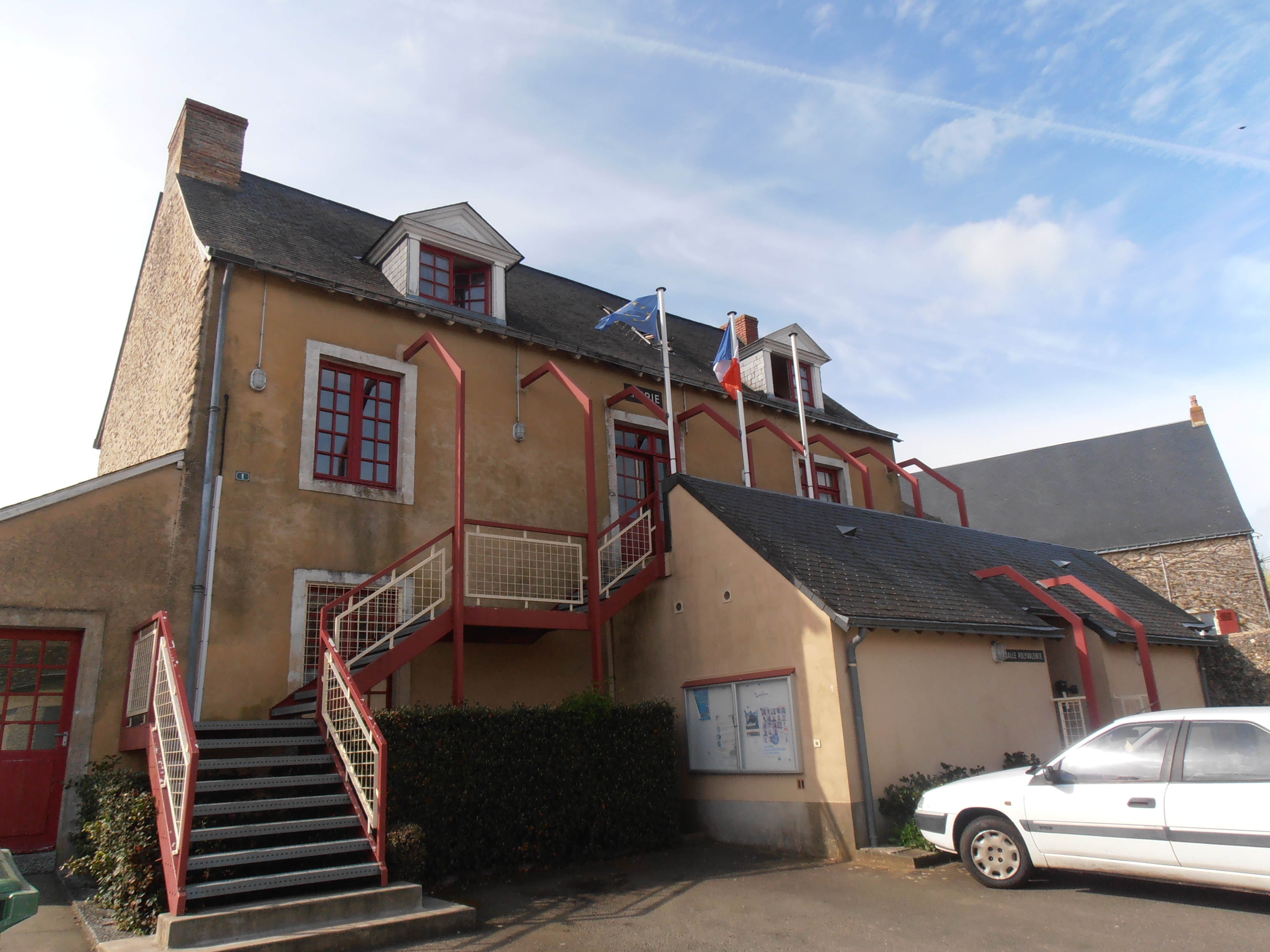 Mairie de Chevillé